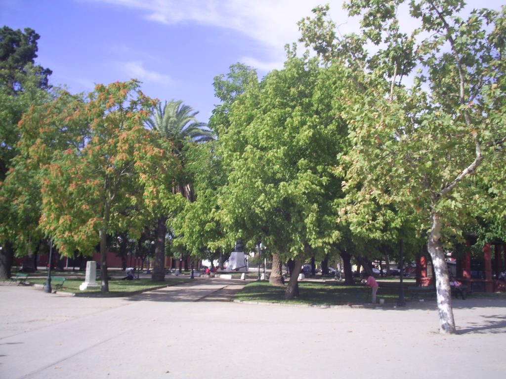 Plaza Arturo Prat de Talca